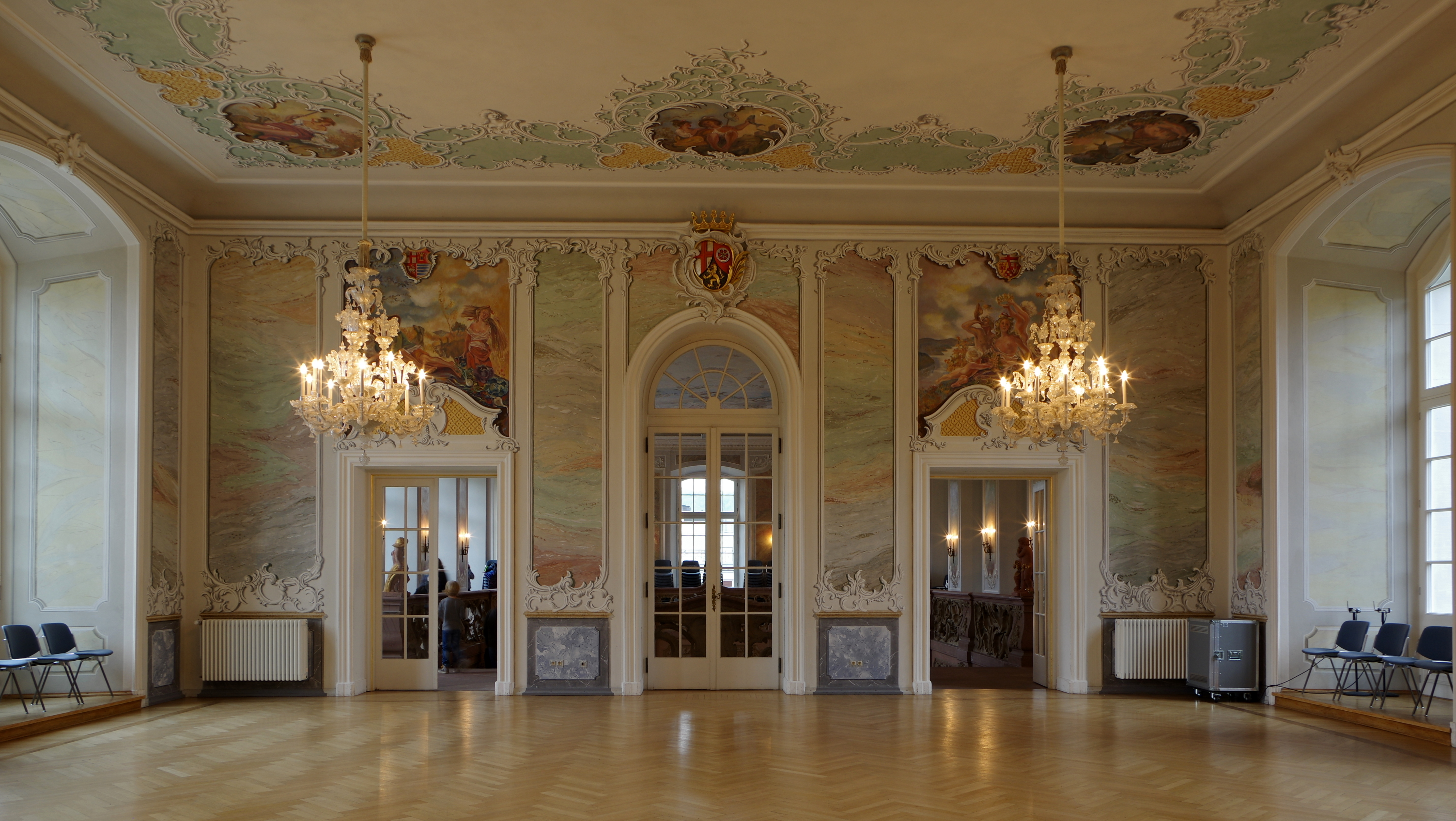 Denkmalzone ehemaliges kurfürstliches Schloss, Neubau des Rokokoschlosses durch Hofarchitekt Johannes Seiz: dreigeschossiger, 22-achsiger Gartenflügel mit Haupt- und Eckpavillon, 1757–61, Fassadenschmuck und Haupttreppenhausskulpturen von Ferdinand Tietz